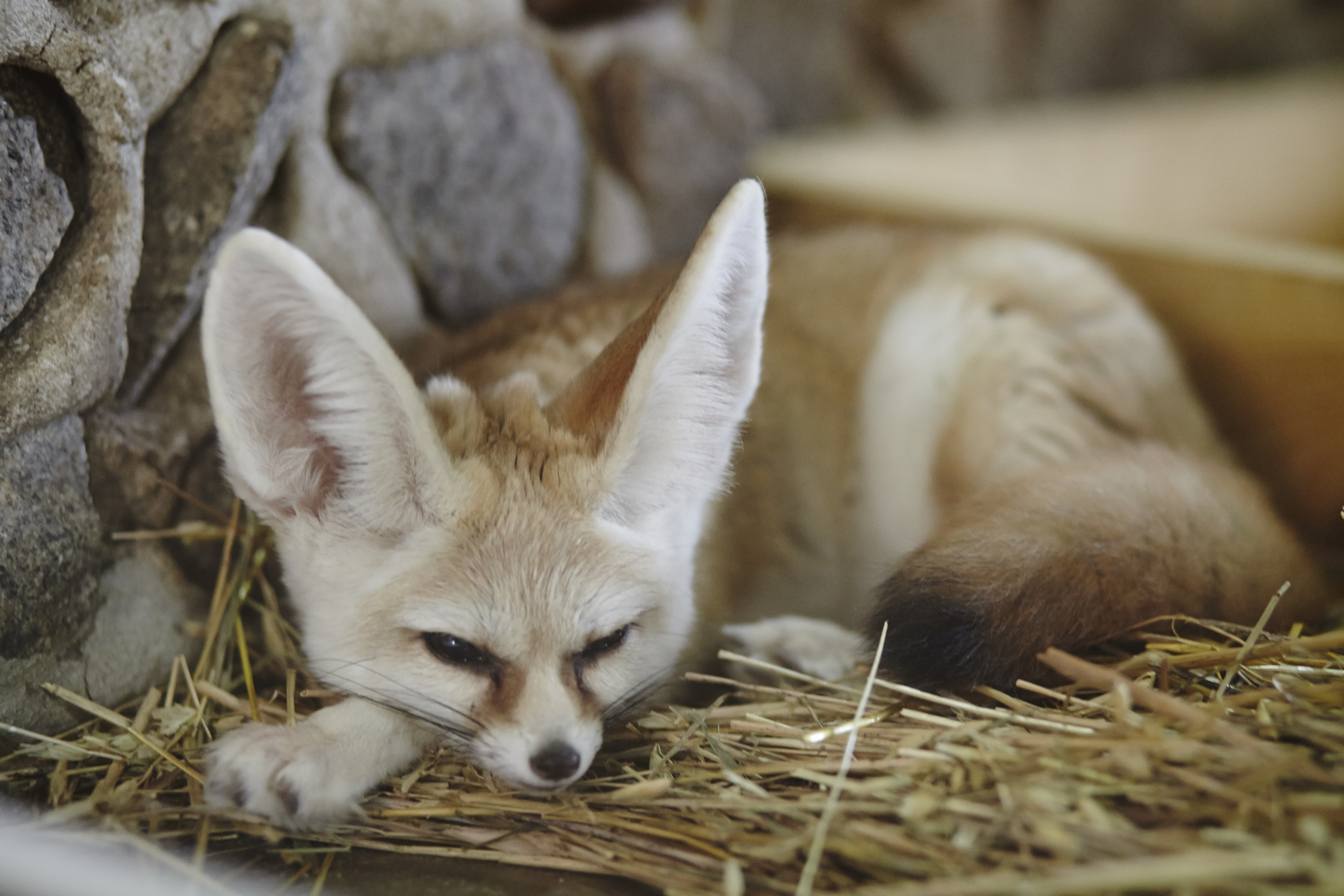 Фенек в зоопарке г. Екатеринбурга.